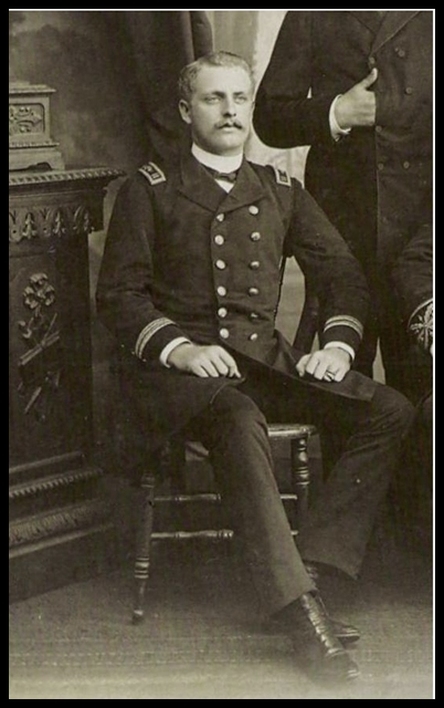 Príncipe Dom Pedro Augusto de Saxe-Coburgo e Bragança